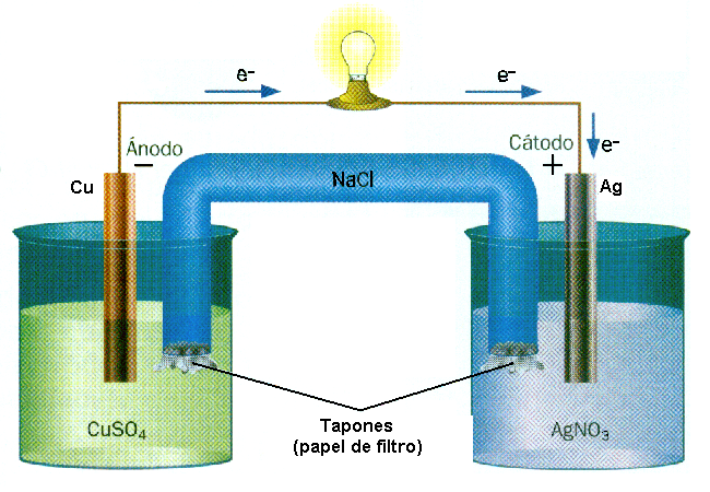 Funcionamiento de la pila cobre-plata.